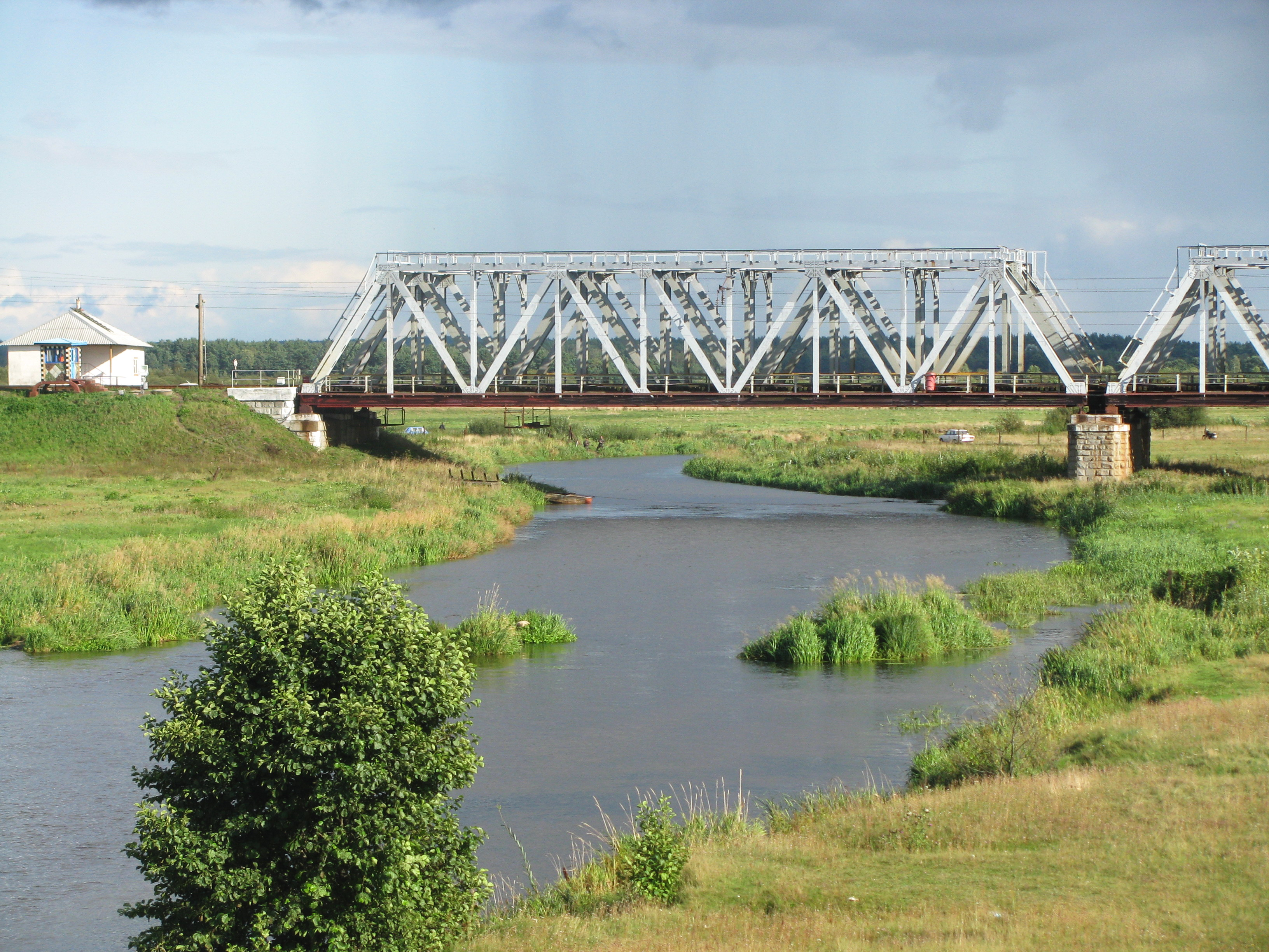 Железнодорожный мост через Нёман в Столбцах, построен в 1870-м